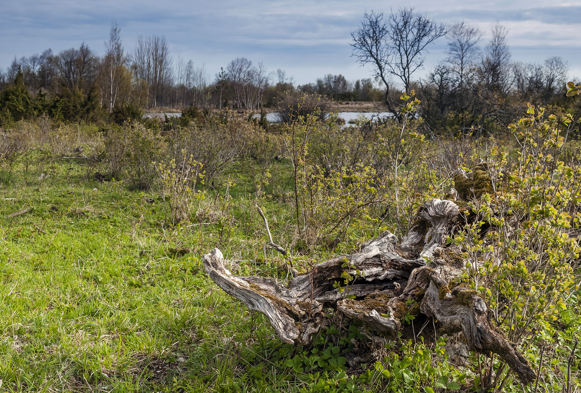 Osmussaar. Kappelkärre.